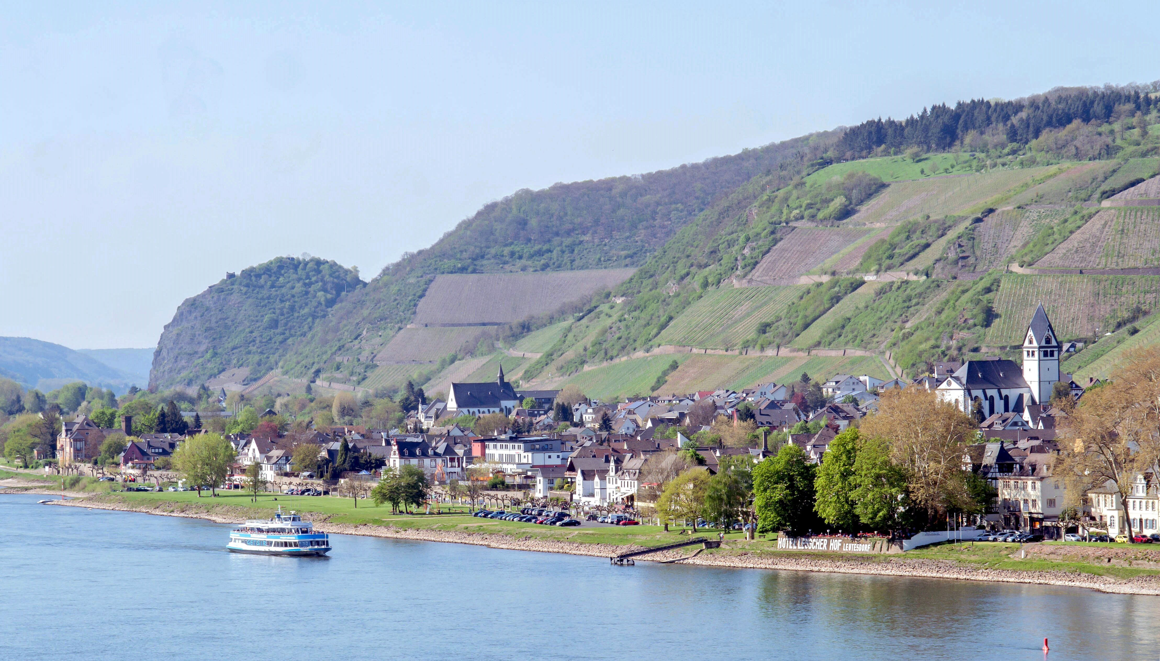 Leutesdorf, im Hintergrund die Burgruine Hammerstein.